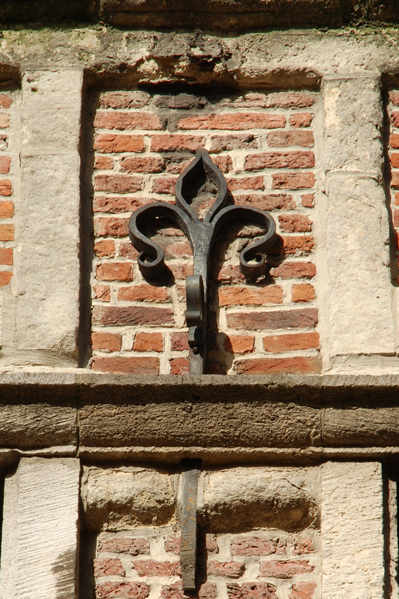 Belgique - Bruxelles - rue des Bouchers - Ancre de façade en forme de fleur de lys